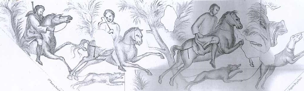 détail mosaique de lillebonne